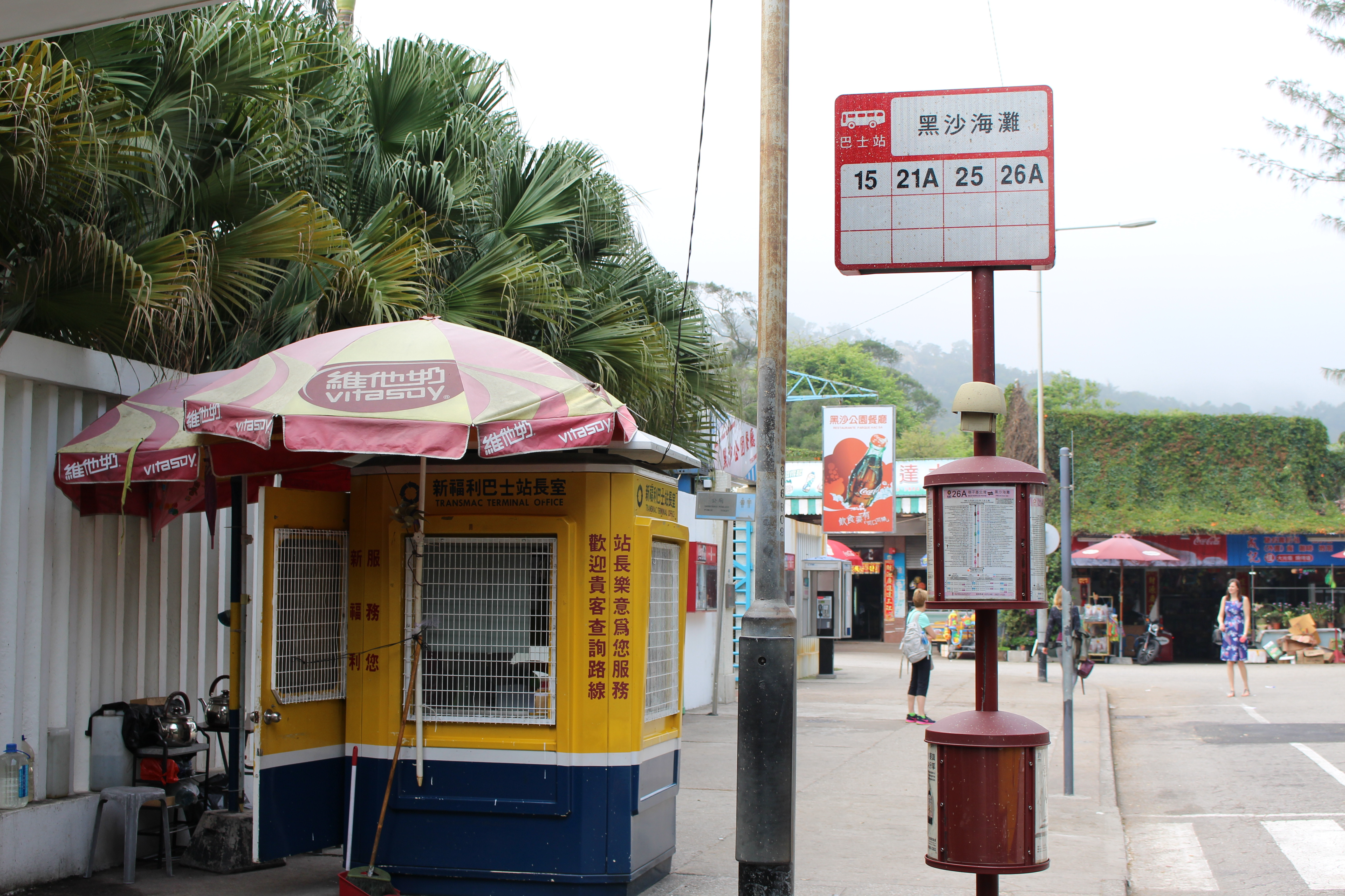 2015年3月的黑沙海灘站.